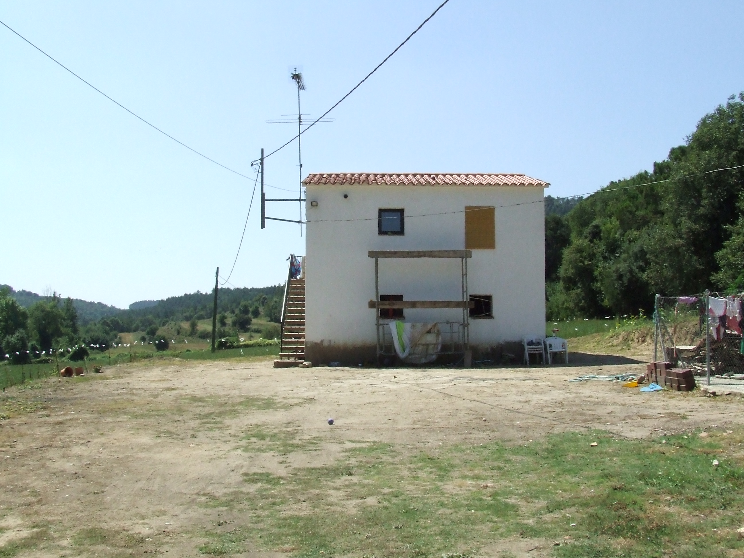 La Casa Nova de la Vileta (Castellcir, Moianès)